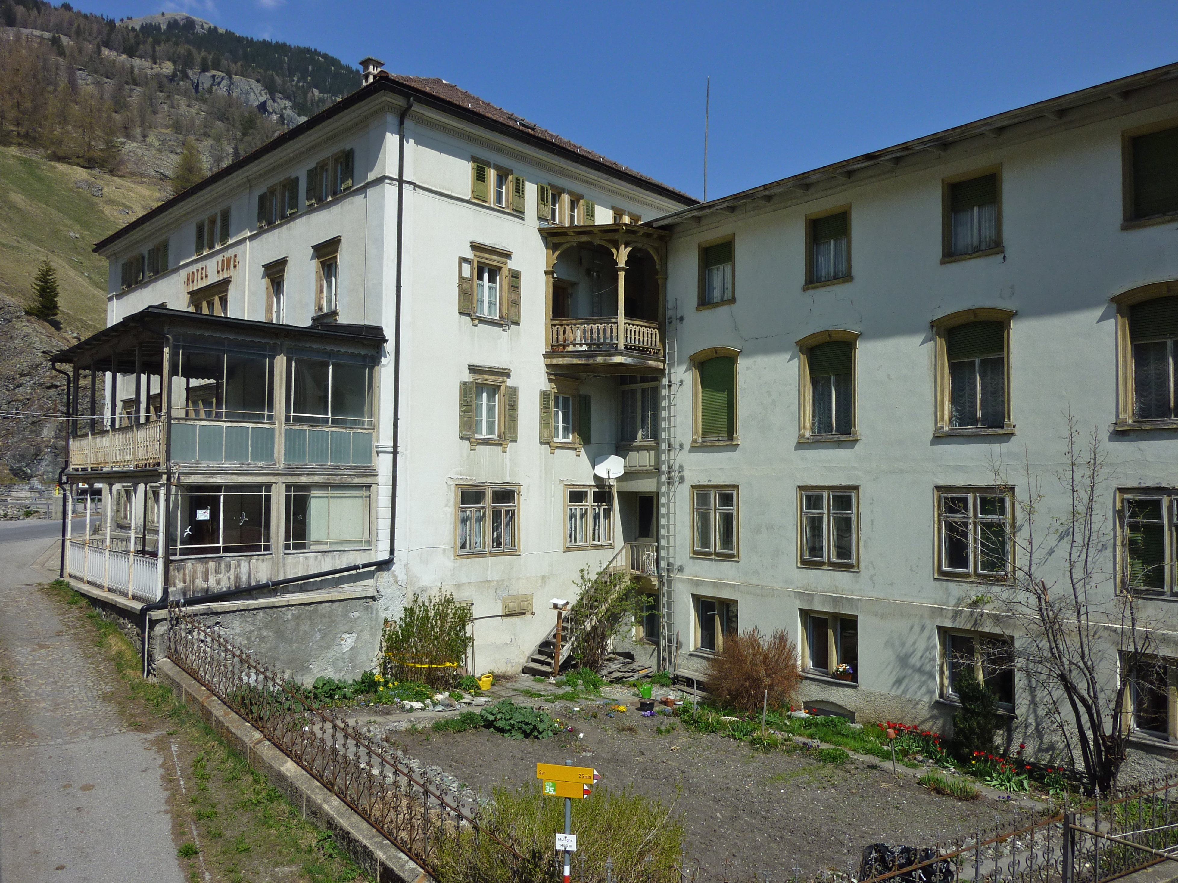 Posthotel Löwen in Mulegns GR Garten vor dem Anbau